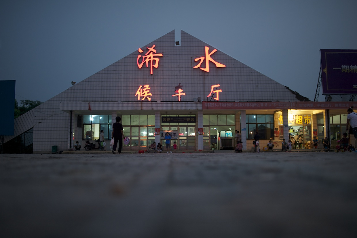 D700 + Samyang 35mm F1.4 家乡老旧的火车站，每日途经会停靠的列车不足20趟。